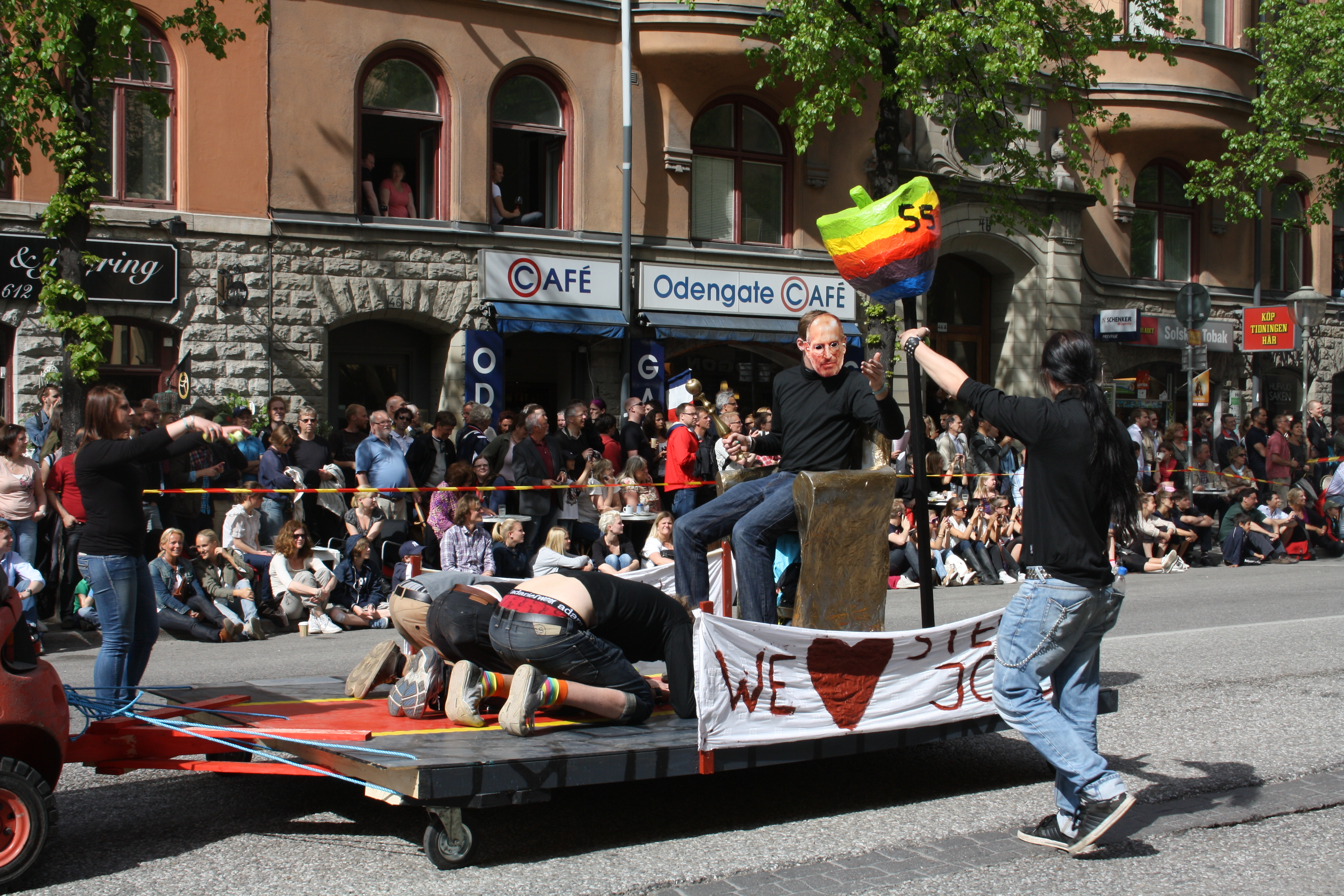 Stockholm Quarnevalen 2011